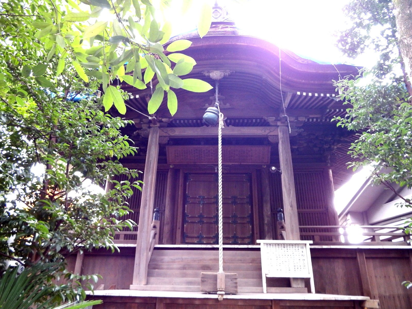 三島神社の旧本殿